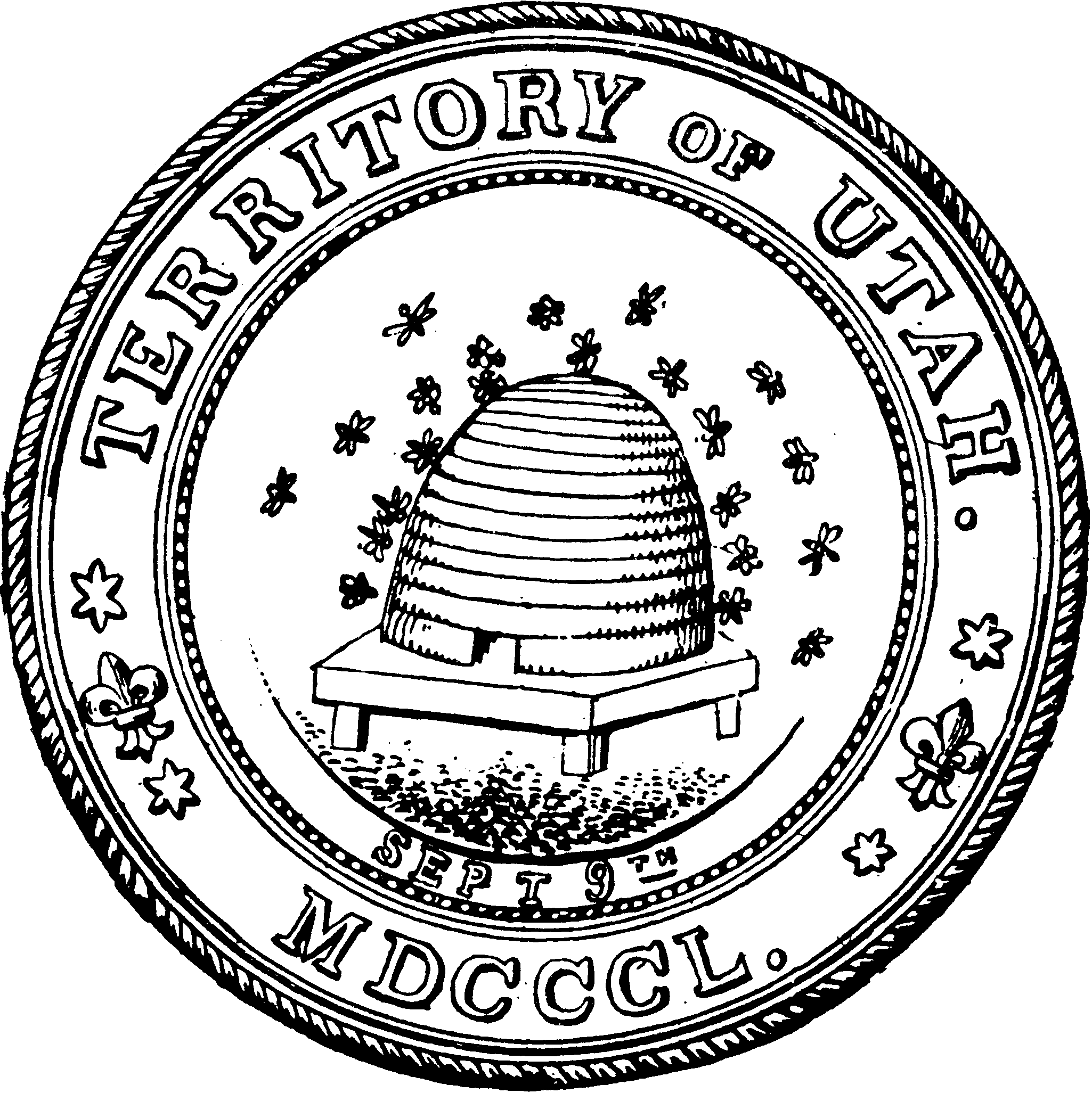 Territorial Seal.